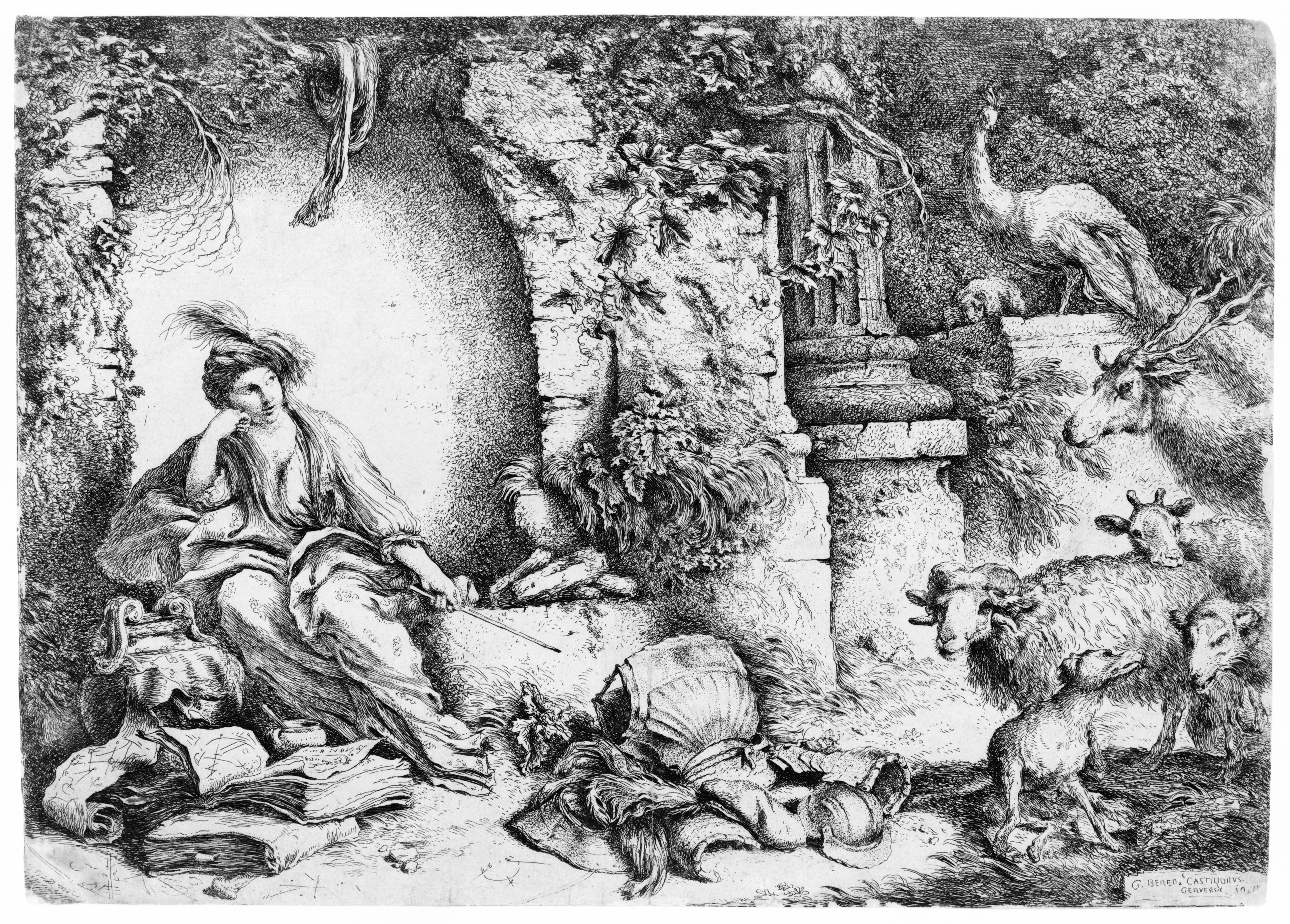 "Melancholy", an engraving by Giovanni Benedetto Castiglione.